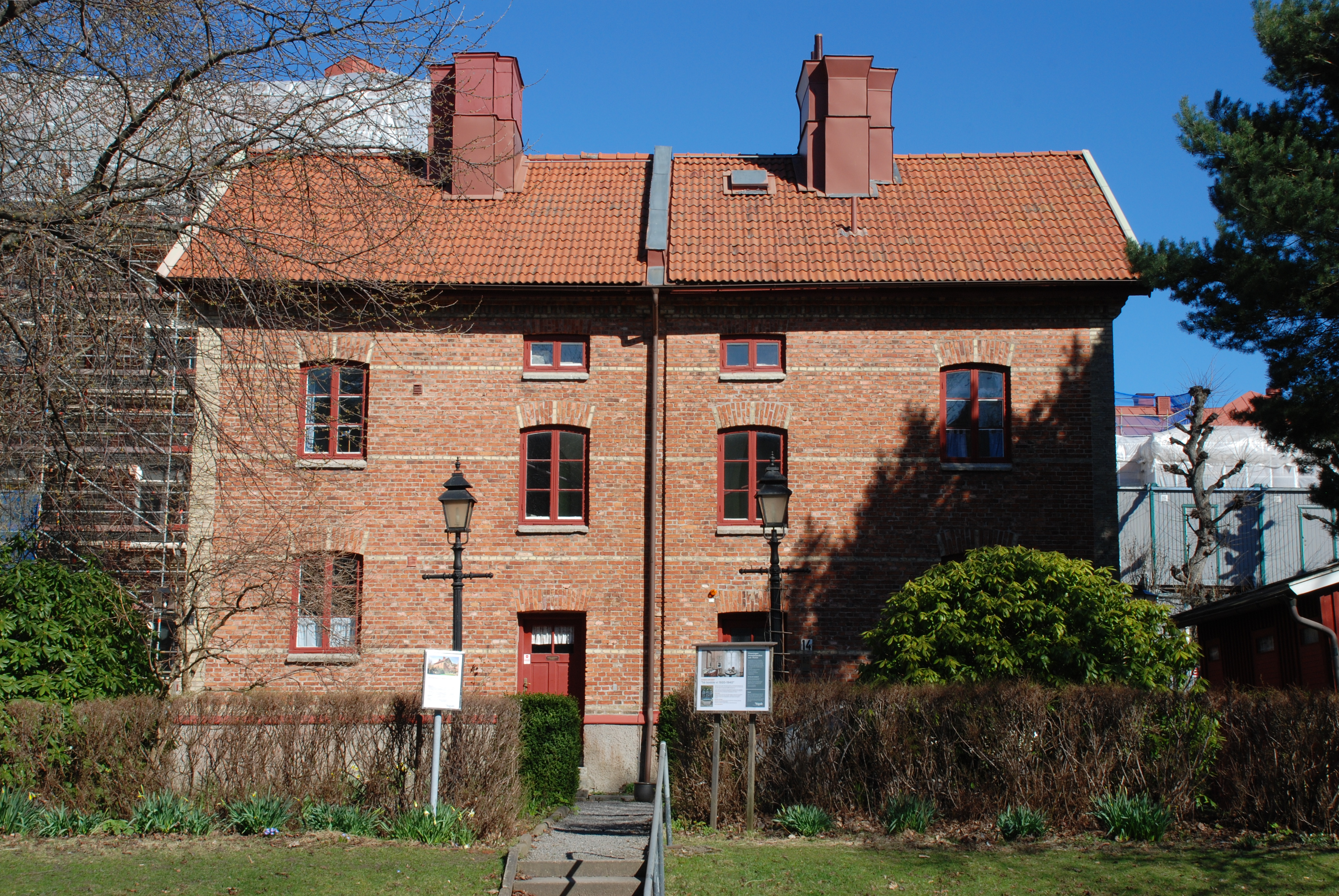 Brunnsgatan 14 i stadsdelen Annedal i Göteborg. Byggnaden kallas Annedalshuset och inrymmer numera Gamla Annedalspojkars museum.